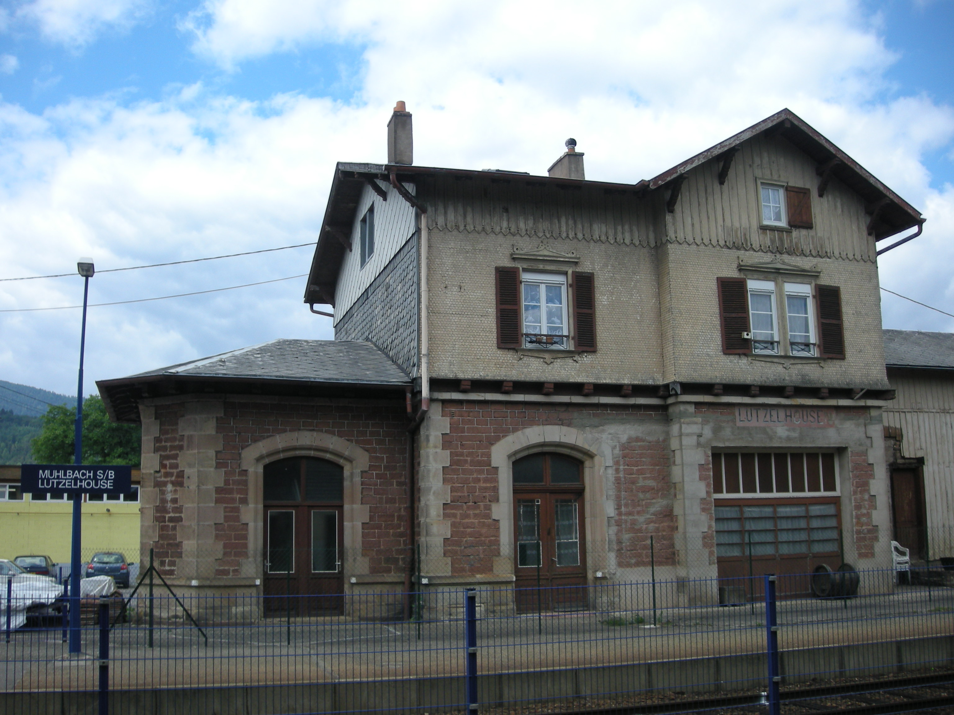 Gare de Muhlbach-sur-Bruche/Lutzelhouse (Bas-Rhin)